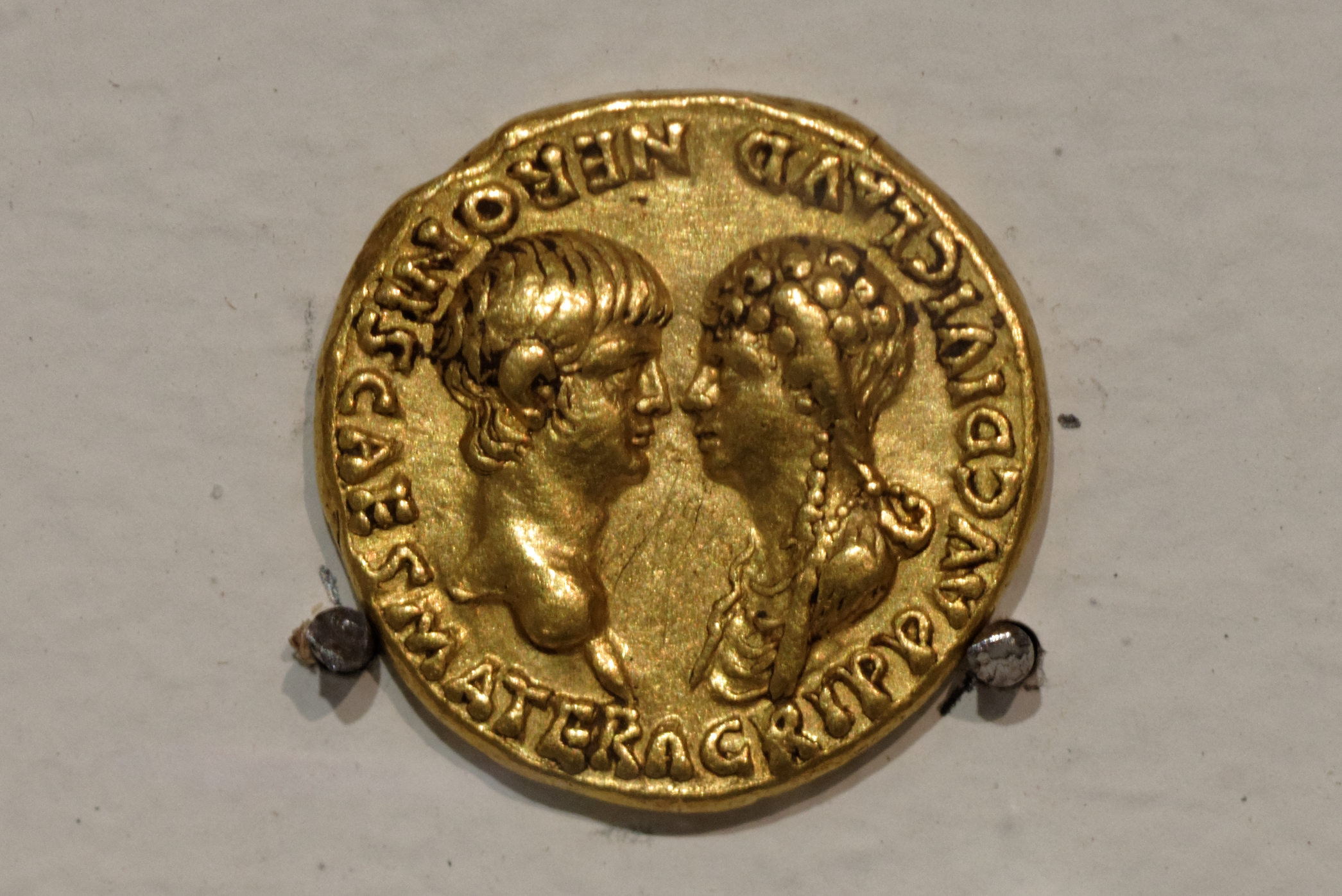 Aureus de Néron D/ AGRIP AVG DIVI CLAVD NERONIS CAES MATER Buste d'Agrippine, épouse du divin Claude, mère de Néron R/ NERONI CLAVD DIVI F CAES AVG GERM IMP TR P EX S C dans une couronne de chêne Musée des beaux-Arts de Lyon, inv. X 618-14